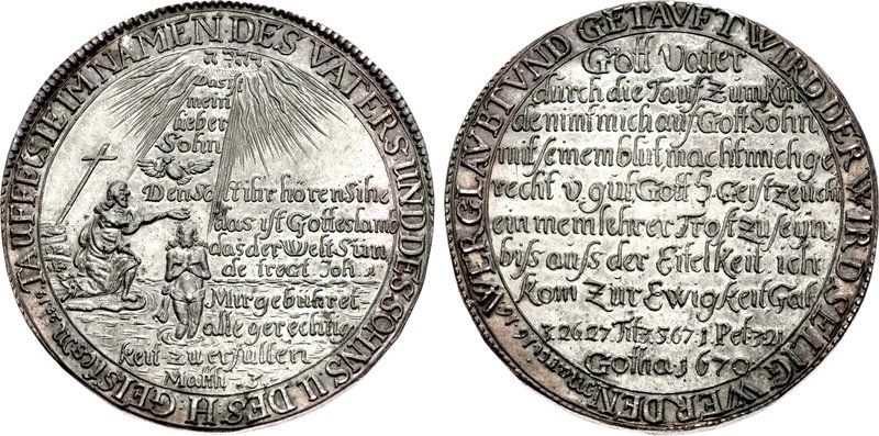 GERMANY, Sachsen-Gotha. Ernst. Duke, 1640-1675. AR Taler (43mm, 29.54 g, 12h). Commemorating the baptism of his granddaughter Princess Anna Sophia. Dated 1670. TAUFFET SIE IM NAMED • DES VATERS • UND DES SOHNS • U • DES • H • GEISTes M 28 • 19 •, baptismal scene; dove and sun above; Jehovah, in Hebrew, within sun; in right field, 12 line inscription; Dasist / mein / heber / Sohn / Den Salt ihr horen Sihe / das ift Gotteslamb / dasder Welt Sun / de trect Joh i / Mirgebuhret / allegerechtia / keit / zuerfullen / Matth • 3 • / WER GLAVBT VND GETAVFT WIRD DER WIRD SELIG WERDEN Marci 16 • 16, ten line inscription: Gott Vater / durch die Taus Zumkin / denimfinich auf. Gott Sohn / mifsemembluf, machfmichge / rechf u. guf. Gott b. Geistzeucht / einmeinlehrer Trost zufeijn / biss auss der Eitelkeit ich / kom zur Ewigkeif Gal / 3.26.27 Tit 3.5.67:1. Pet. 301 / Gotha • 1670. Fassbender 2773; Schnee 426; Davenport 7450. EF, beautifully toned.